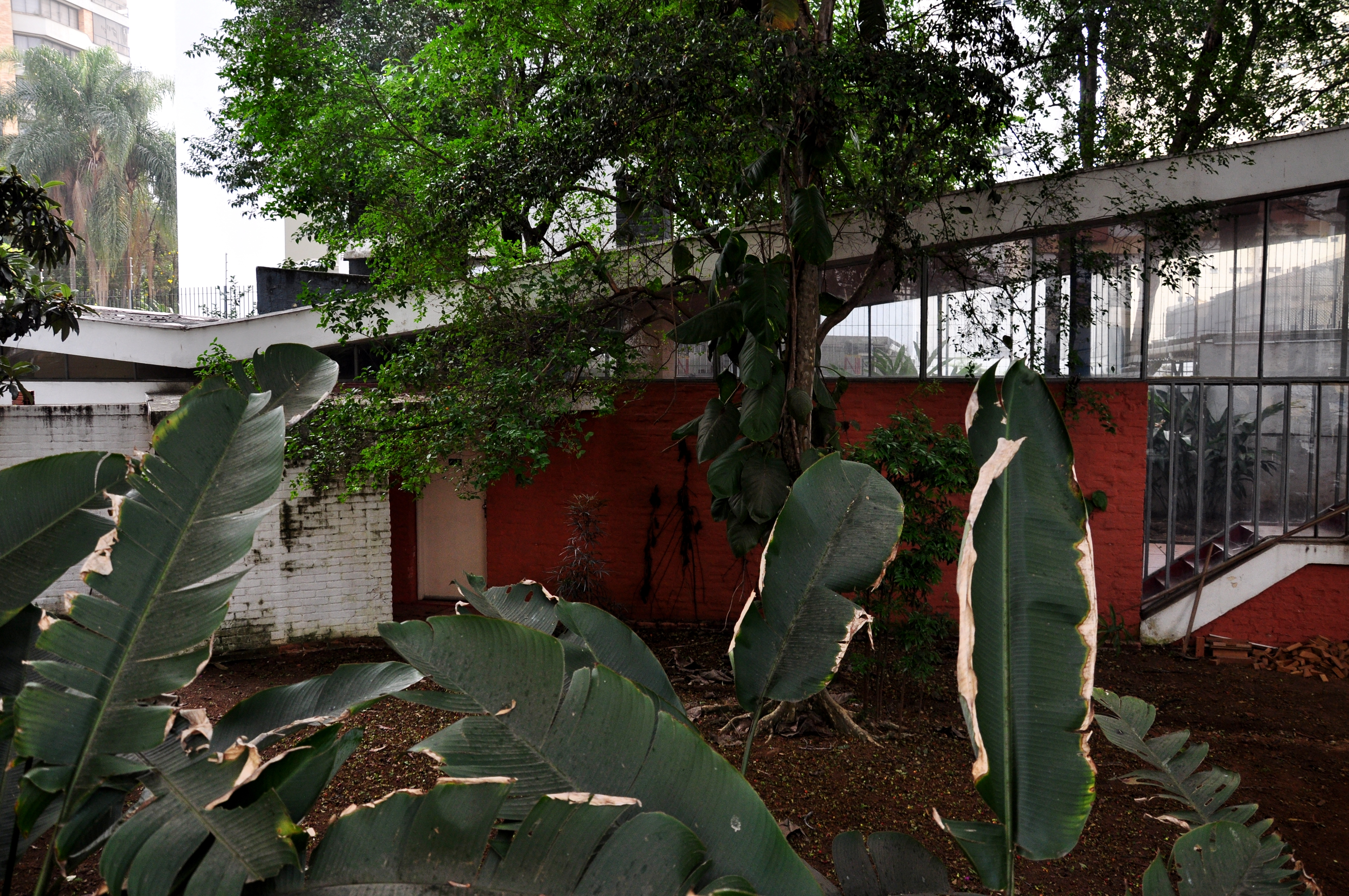 Visão frontal de parte da fachada de uma das construções da Residência Vilanova Artigas II, em São Paulo (SP), Brasil.